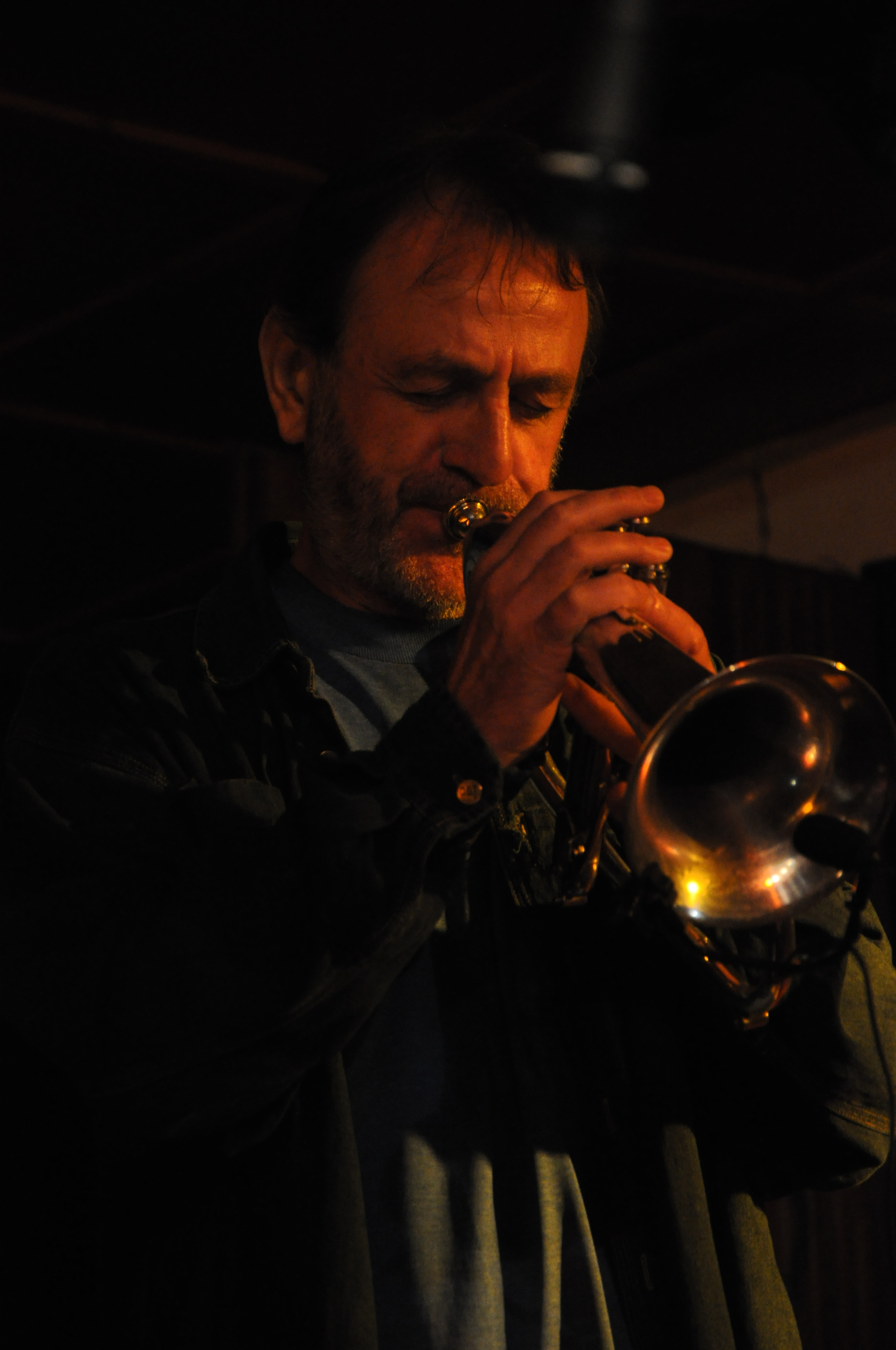 Jan Spálený a ASPM na festivalu Otevřeno Jimramov 2009